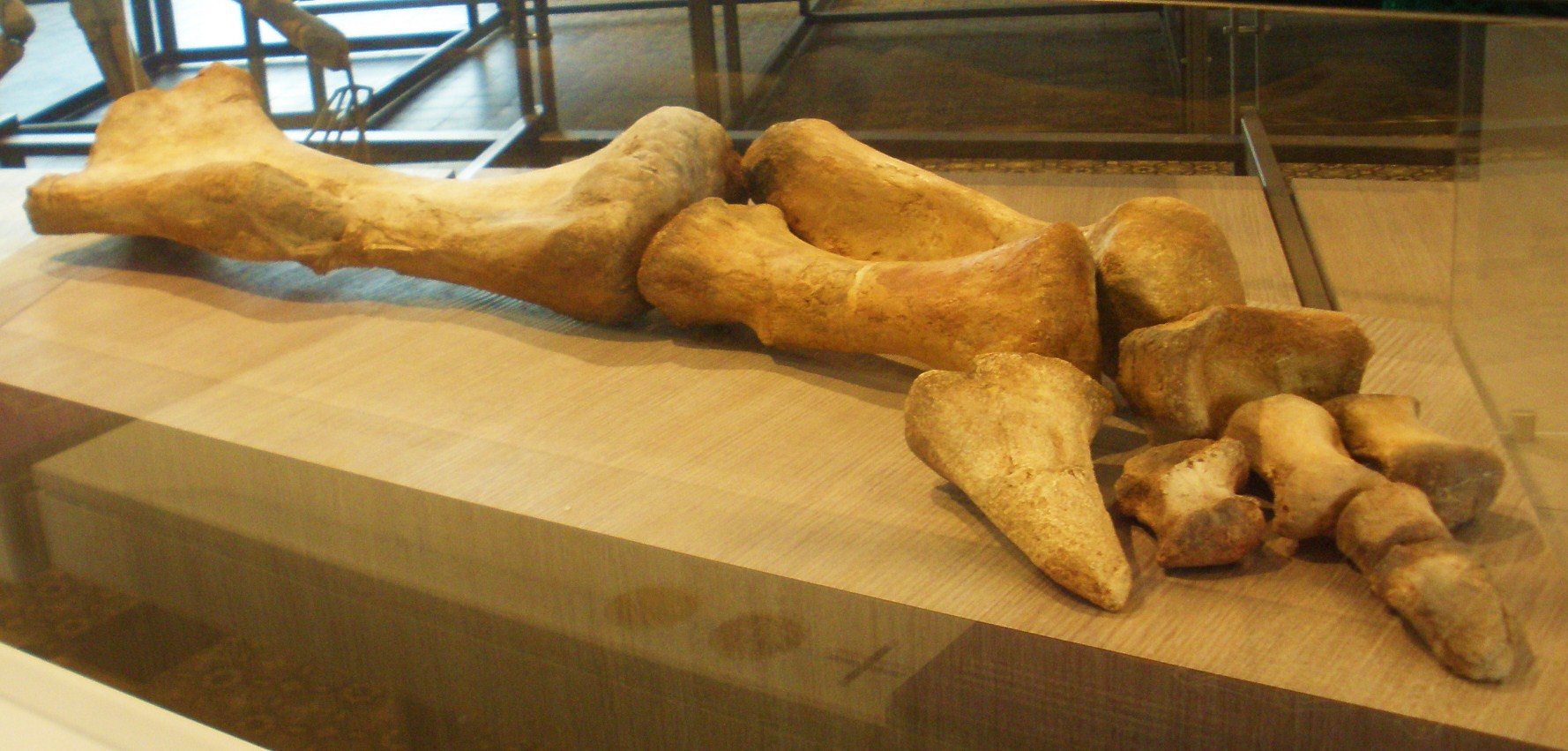 Fossil of Lurdusaurus, an ornithopod dinosaur Took the photo at Musee d'Histoire Naturelle, Brussels